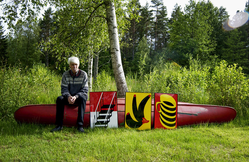 Hans Björn vid egenbyggd kanot och egna verk